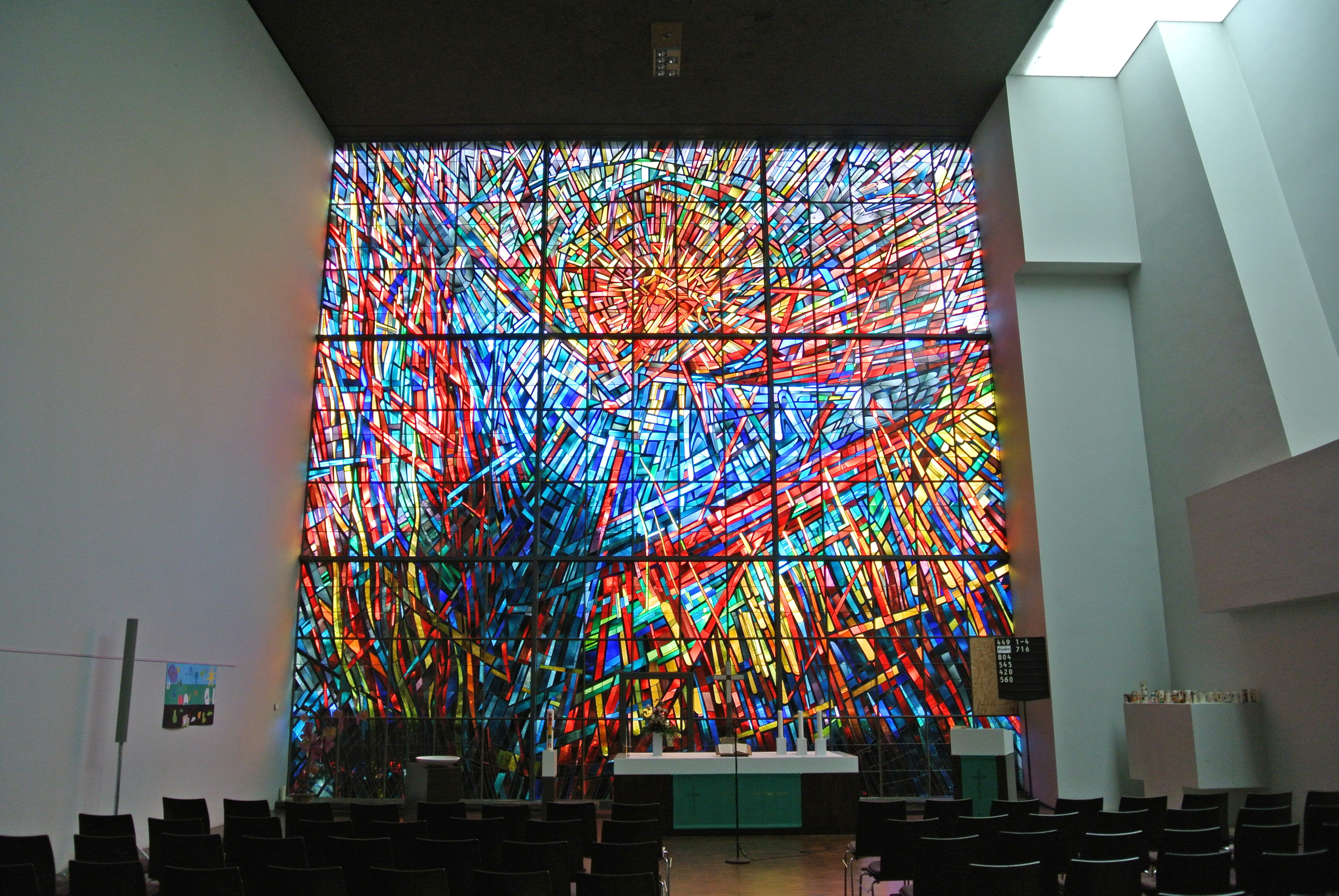 Evangelische Dornbuschkirche in Frankfurt-Dornbusch, Mierendorffstraße 5; Bauzeit 1962, 2003-2005; Architekten Ernst Görcke und Ludwig Müller, umgbaut und verkleinert von Meixner Schlüter Wendt; Innenraum